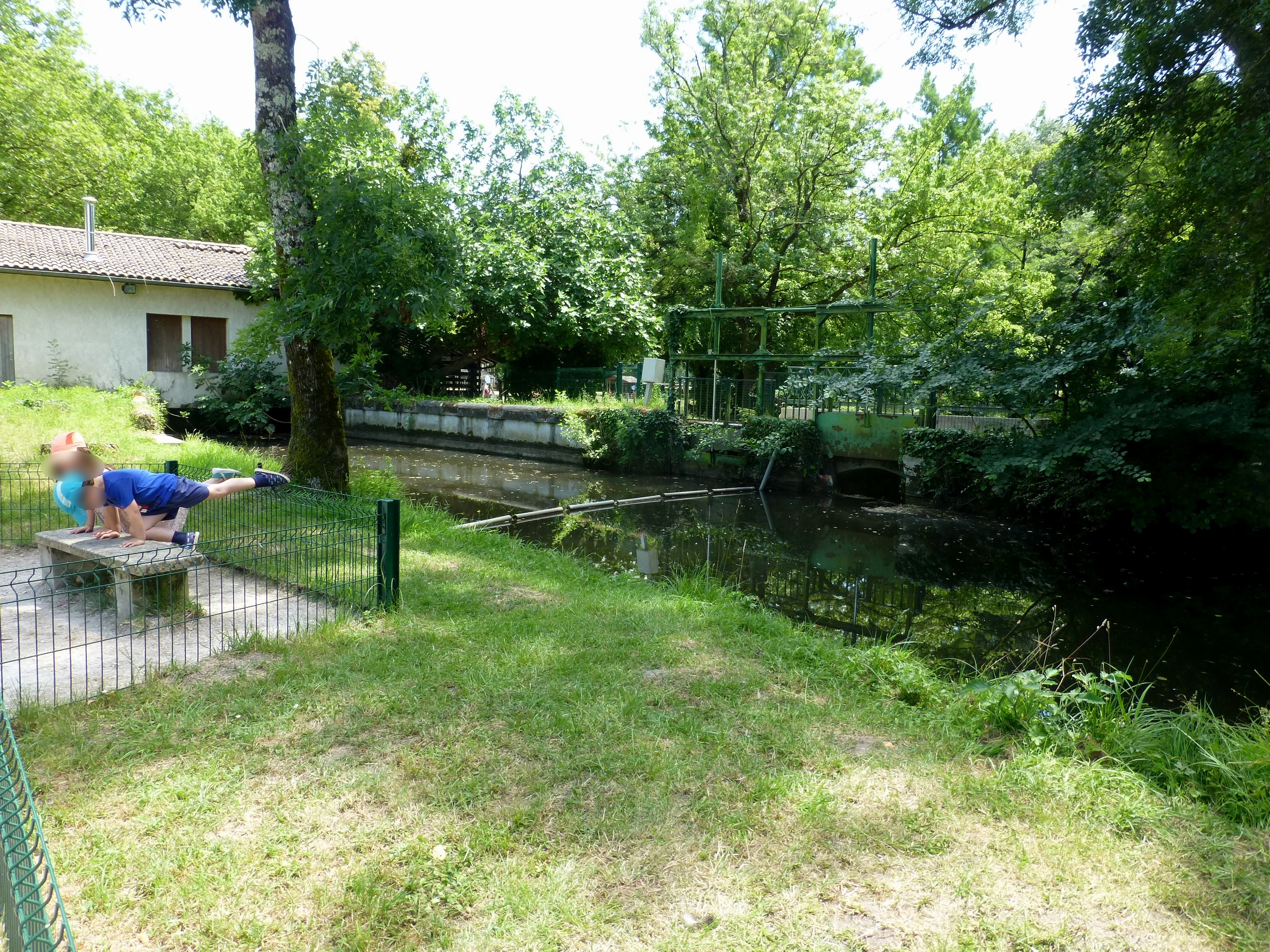 Gradignan, Parc du Moulineau ː retenue d'eau sur l'Eau Bourde.